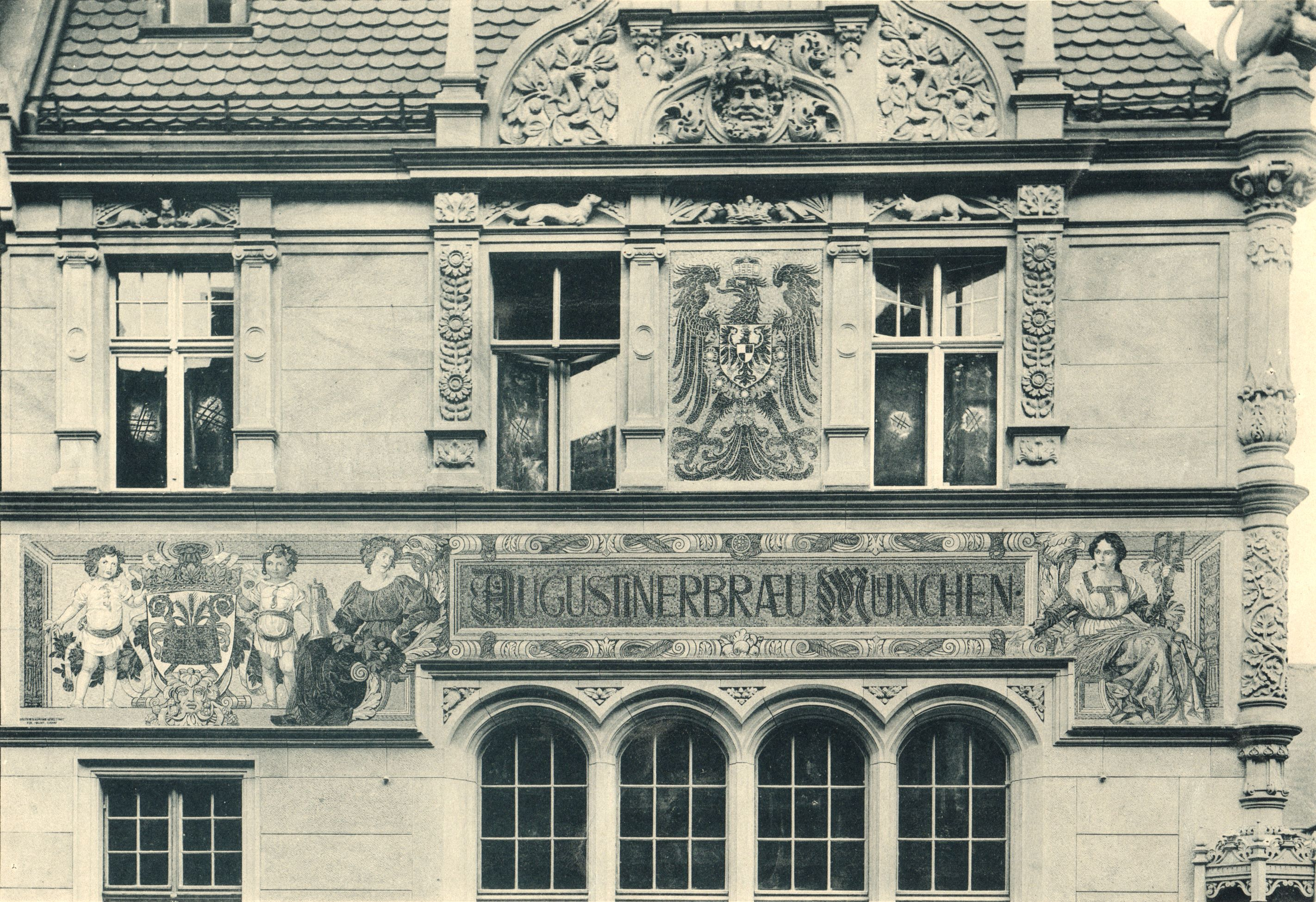 Geschäftshaus Friedrichstraße 84, Architekten Kayser & von Großheim: Werbemosaiken ausgeführt durch die Deutsche Glasmosaik-Gesellschaft Puhl & Wagner − Rixdorf, Berlin